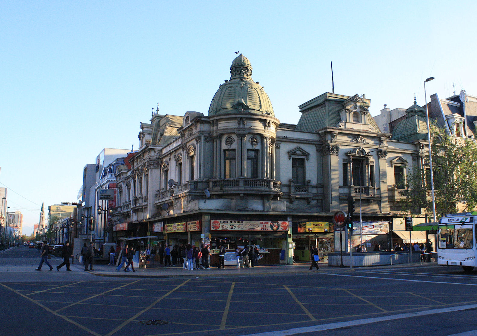 Palacio Aldunate, Santiago de Chile.